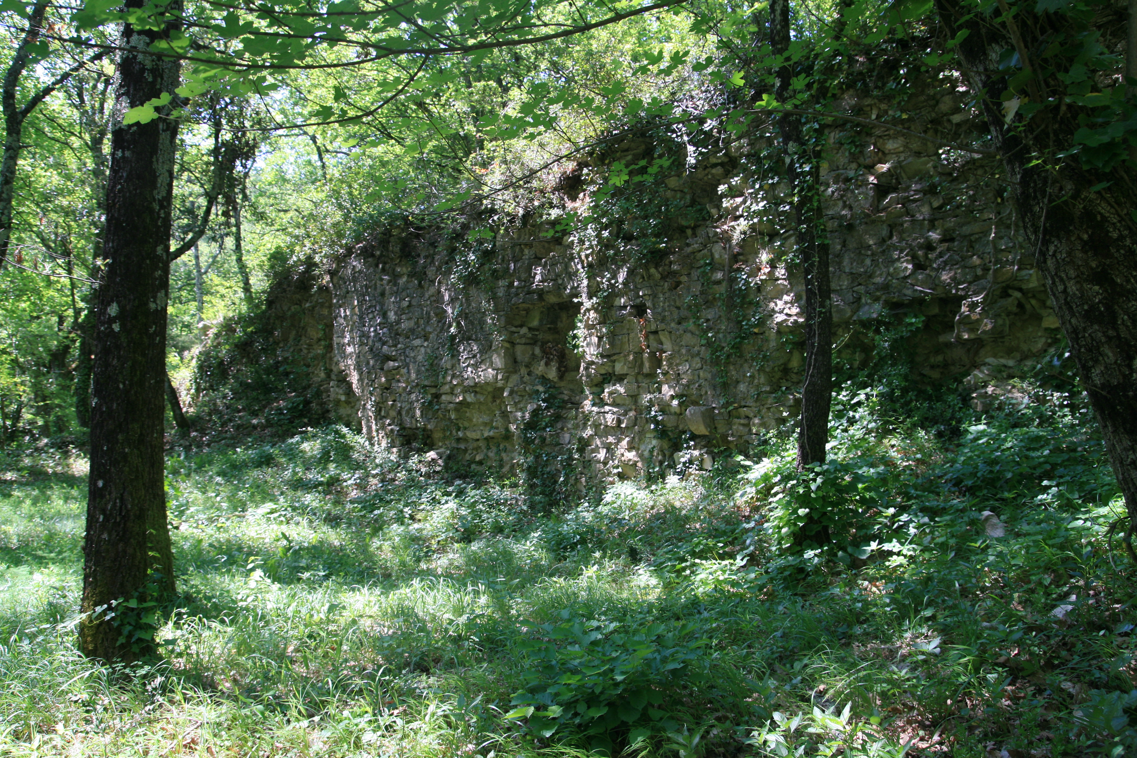 Ruines de l'Abbaye de Prébayon dans le massif des Dentelles